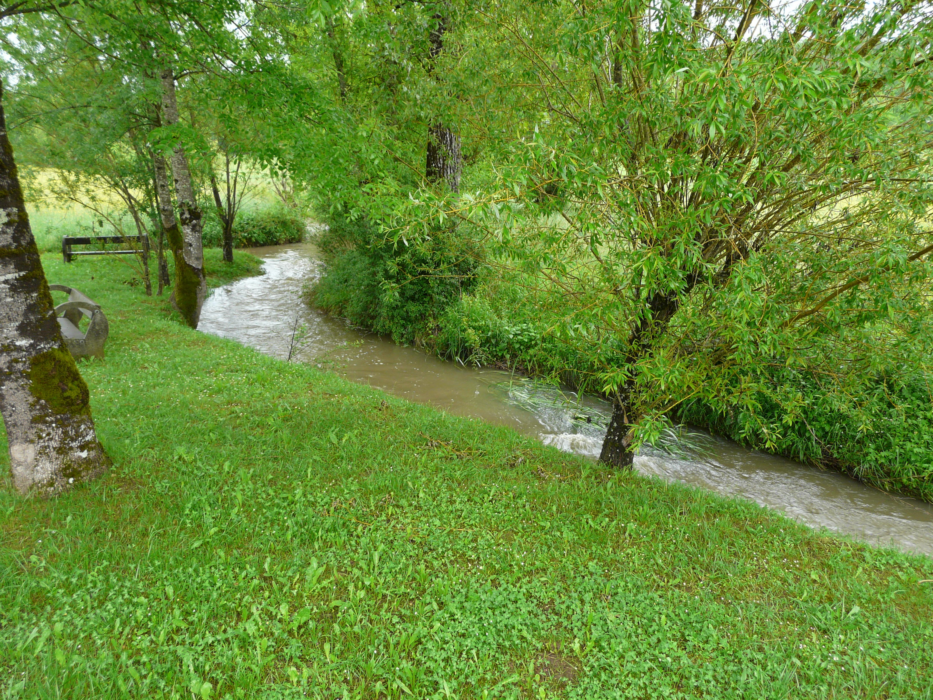 Ruisseau le Trincou au sud du lieu-dit Bironnaud, Villars, Dordogne, France. Vue vers l'amont.